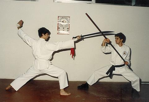 Sparring dao gun